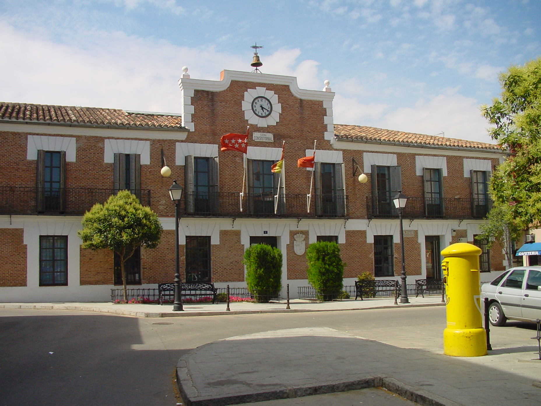 Ayuntamiento de Paracuellos de Jarama.